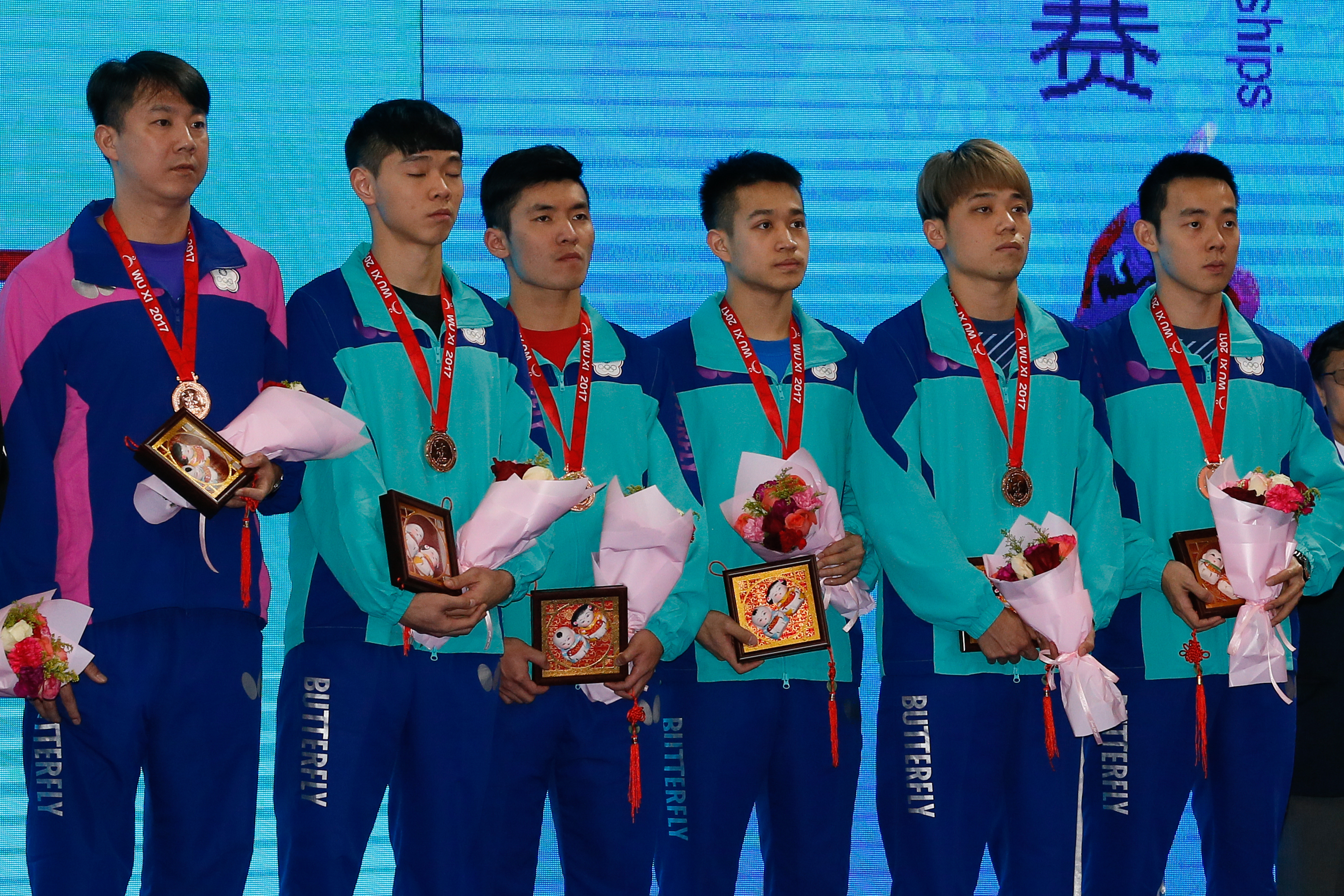 _K0K6313